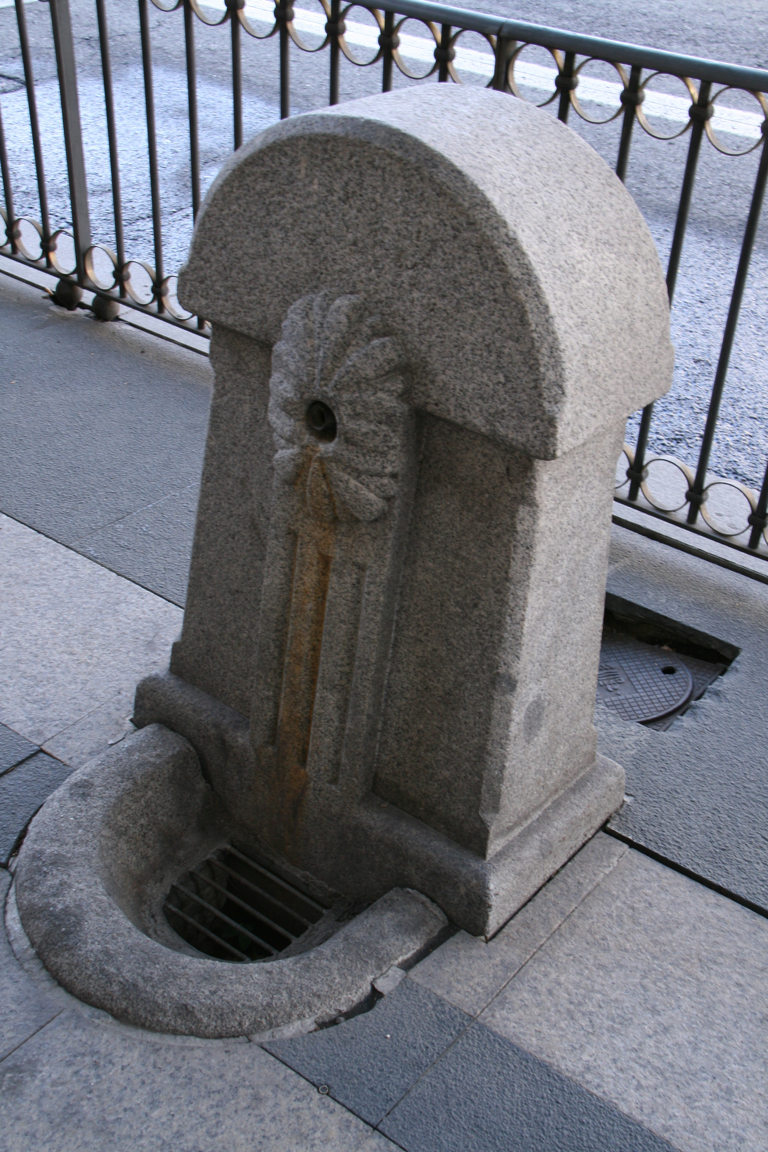 Funte de Calle Alcalá (Junto al Palacio de Comunicaciones)